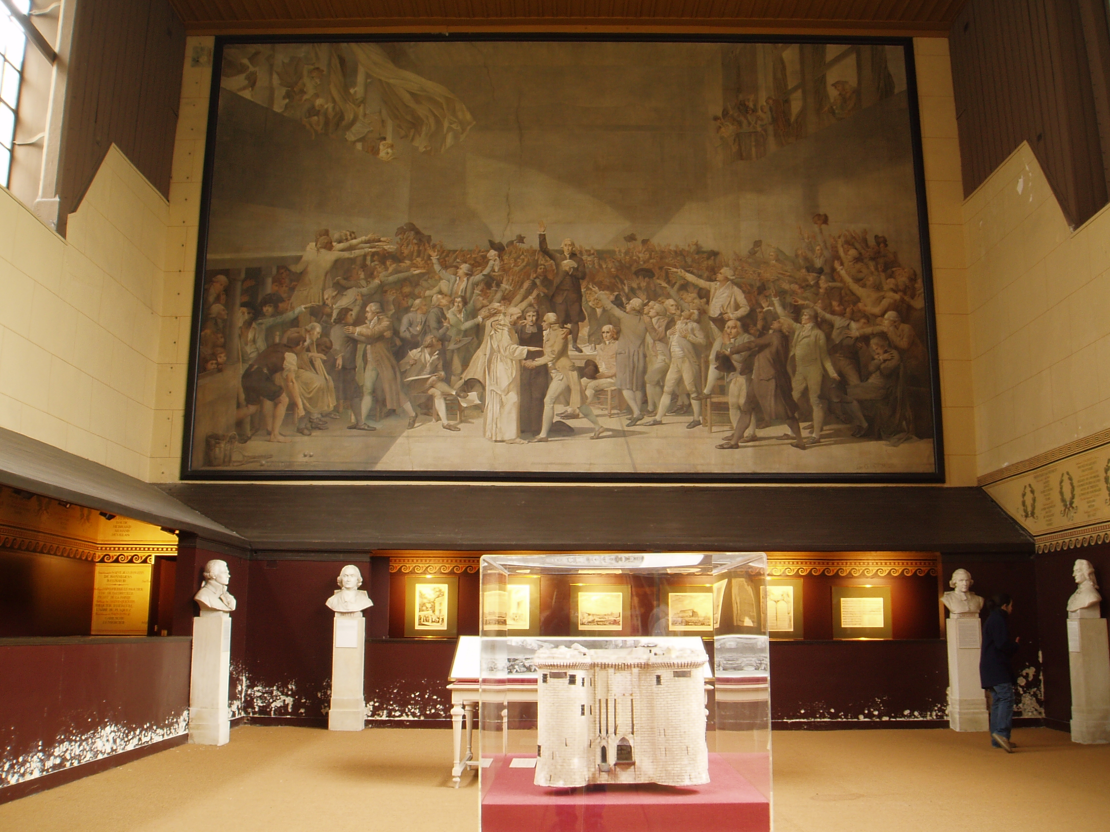 Salle du jeu de Paume à Versailles Au fond, reproduction du tableau « Le Serment du Jeu de paume » de Jacques-Louis David. Au centre, maquette de la Bastille, taillée dans un bloc de pierre venant de la forteresse elle-même.